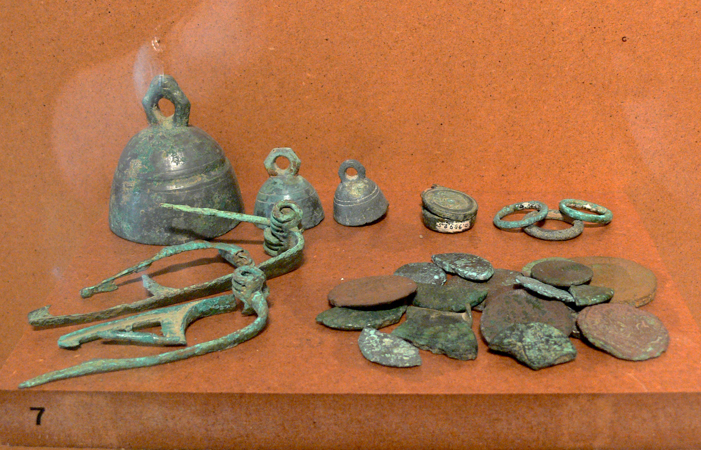 Clochettes, anneaux, fibules, boîte à sceaux, monnaies en bronze découverts lors des fouilles du fanum de Montjustin (Haute-Saône). Vesoul, musée Georges-Garret, dépôt de l'Etat.